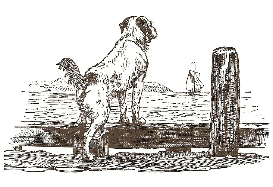 Tegningen Hunden ved stranden af Lundbye